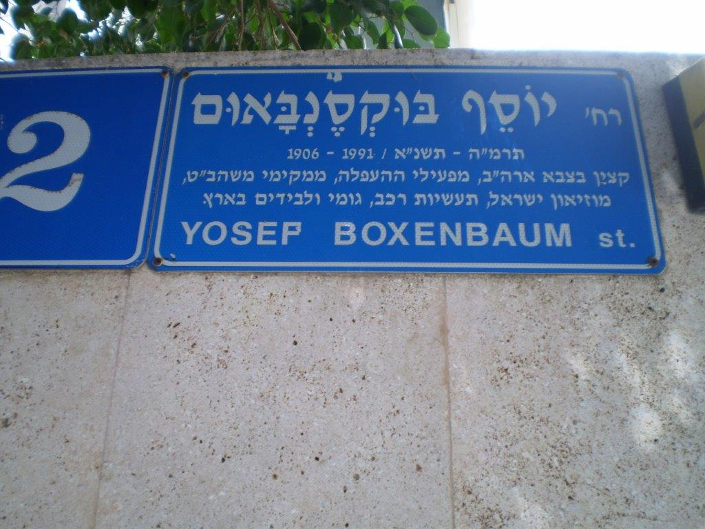 רחוב יוסף בוקסנבאום